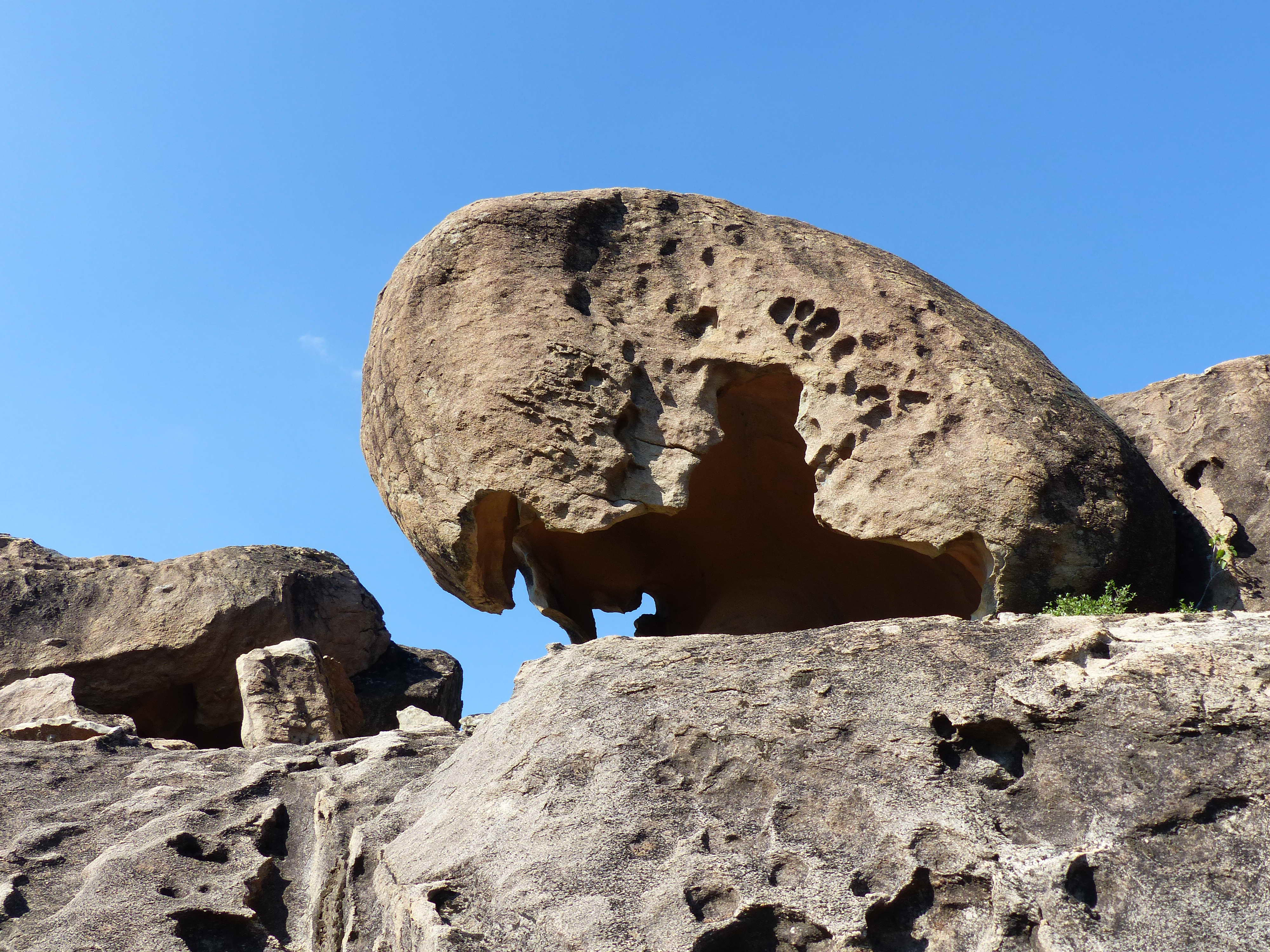 Rundliche "Wollsäcke" mit der typisch aushöhlenden Tafoni-Verwitterung in den Augengneisen der Beşparmak Dağları/Latmos bei Bozalan